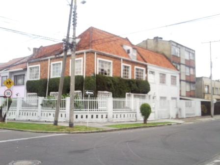 Casa tradicional bogotana entre calles 63 y 64 carreras 17 a la 24